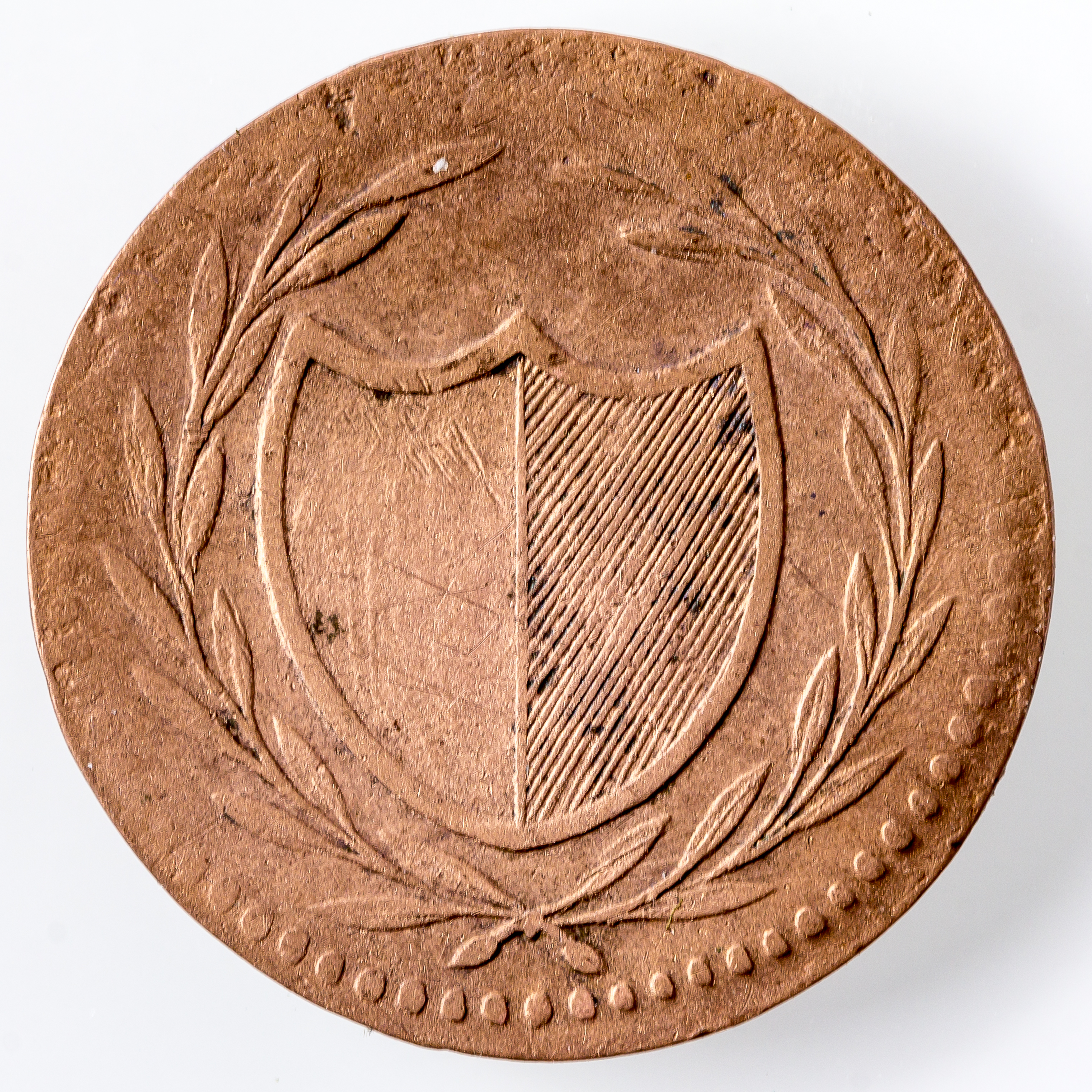 Judenpfennig 1819